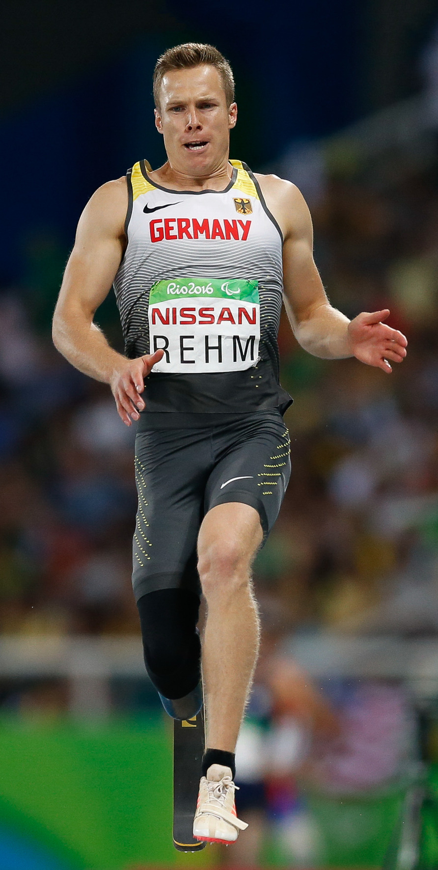 Rio de Janeiro - Alemão Markus Rehm vence salto em distância T44 nos Jogos Paralmpicos Rio 2016.